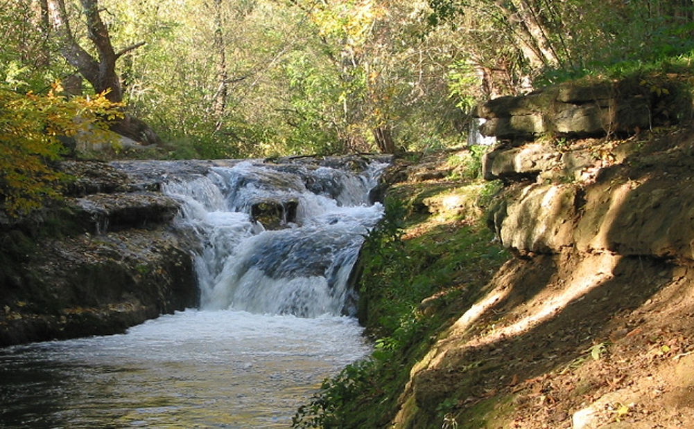 Der Filswasserfall im Stadtteil Altenstadt in Geislingen an der Steige